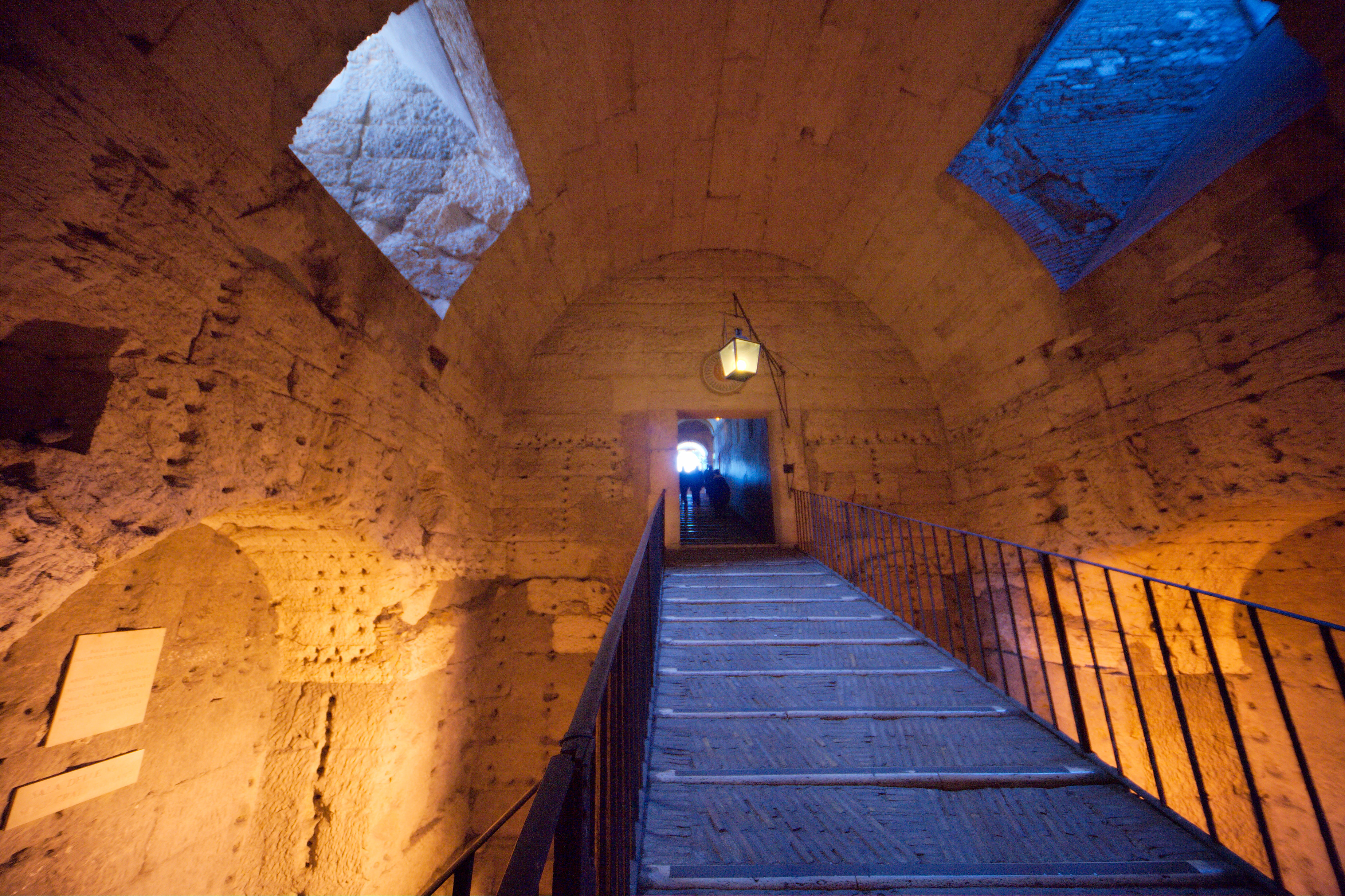 La stanza che un tempo conteneva il sarcofago dell'imperatore romano Adriano, in Castel Sant'Angelo a Roma, edificio che fu costruito in origine come suo mausoleo.